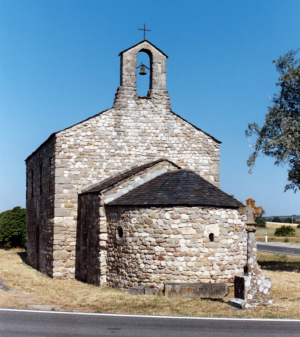 France - Languedoc - Aude - Chapelle de la Madeleine (Pezens)